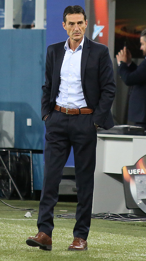 Дзюба на радаре у защитников «Вардара»